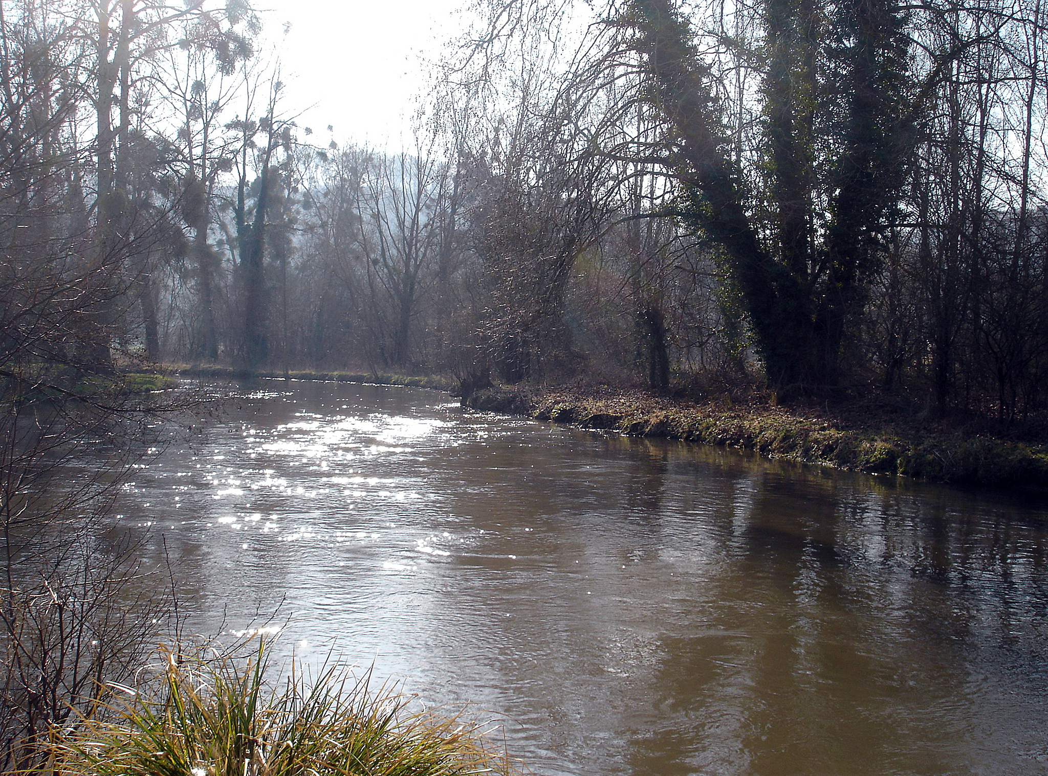 La Bresle à Bouvaincourt-sur-Bresle (80)